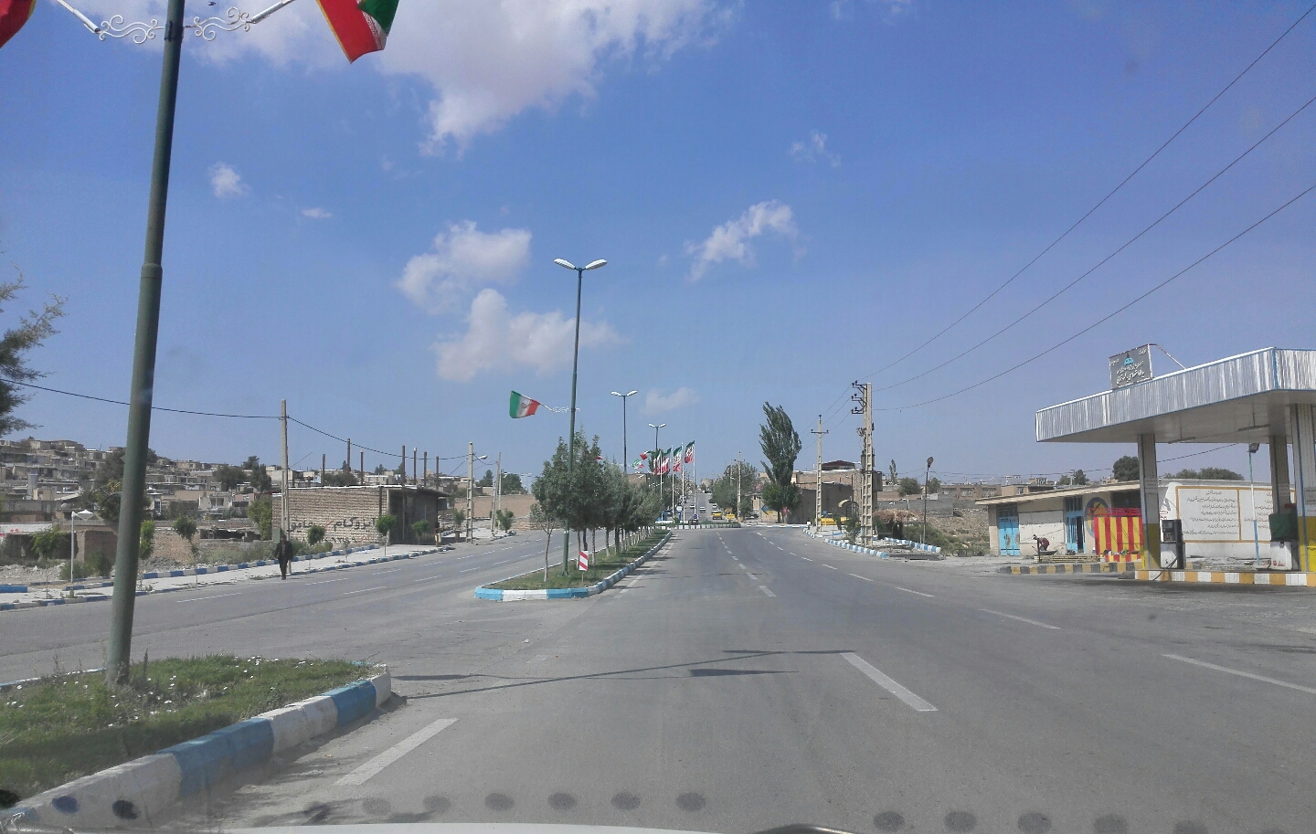 گهواره و‌بلوار ولیعصر که به میدان امام علی منتهی میشود،هفت مهر نودو‌چهار